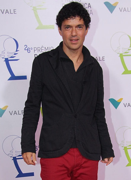 Jorge Vercilos - 26° Prêmio da Música Brasileira 2015, no Theatro Municipal, no Centro do Rio de Janeiro/RJ. (10/06/15) Foto: Roberto Valverde/Divulgacão